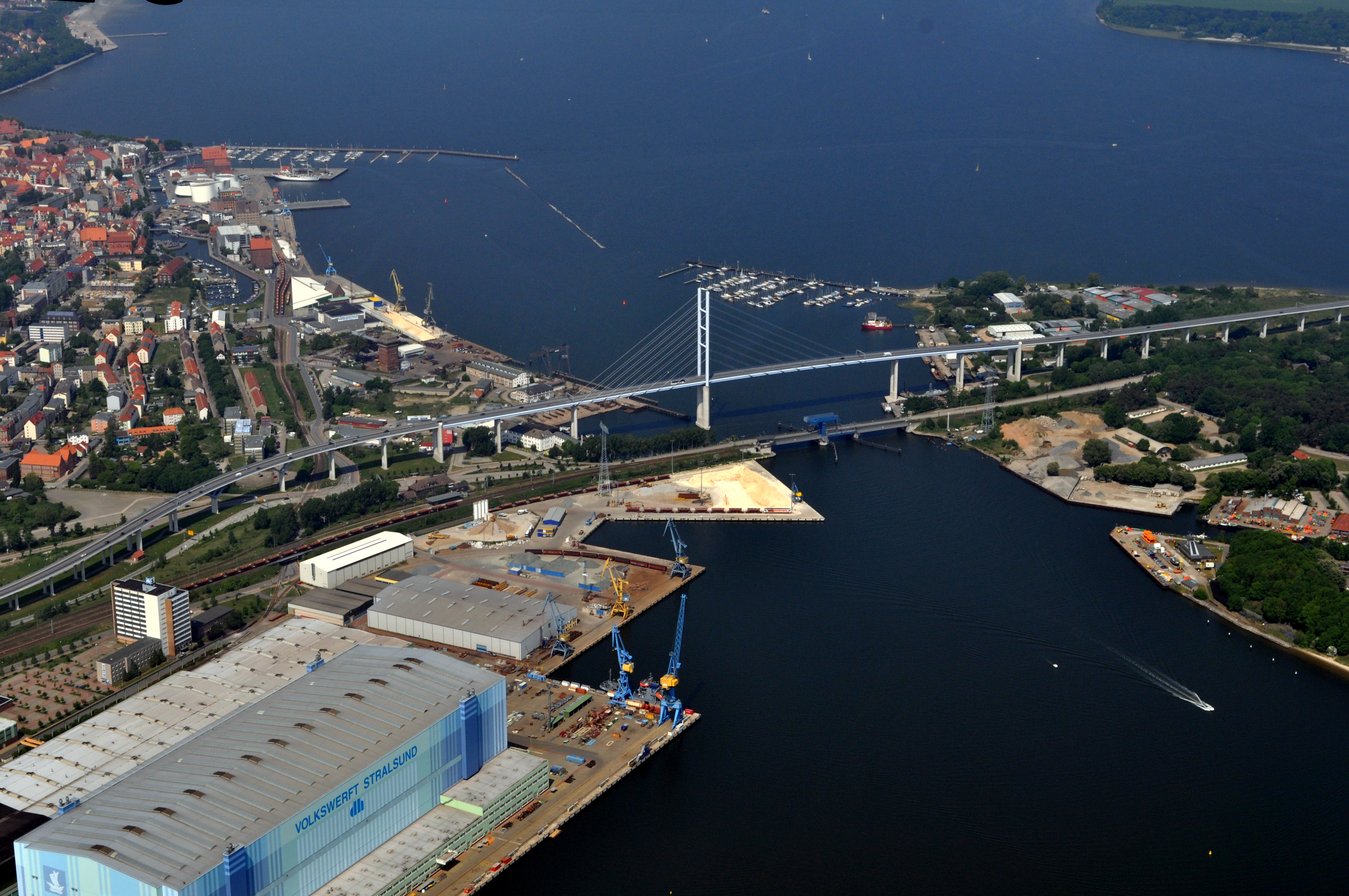 Die Bilder wurden von mir während eines einstündigen Rundflugs ab Flugplatz Güttin am 21. Mai 2011 aufgenommen. Die Bildbeschreibung steht im Dateinamen. Aufgenommen mit einer Nikon D5000 durch das Seitenfenster des Flugzeugs.